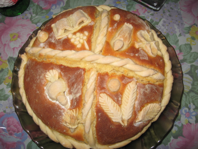 Slavski pravoslavni kolac na tanjiru